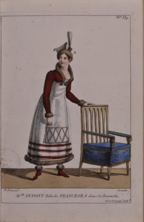 Affiche de la comédie en trois actes et en prose de François Roger et Auguste Creuzé de Lesser, représentée sur le théatre de la Comédie-Française le 15 juillet 1809.